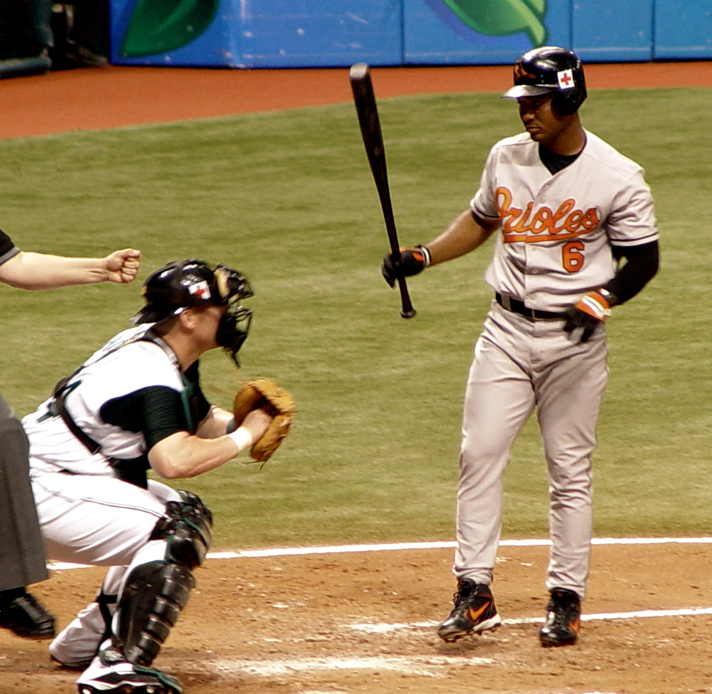 Melvin Mora "gets rung up" for strike three